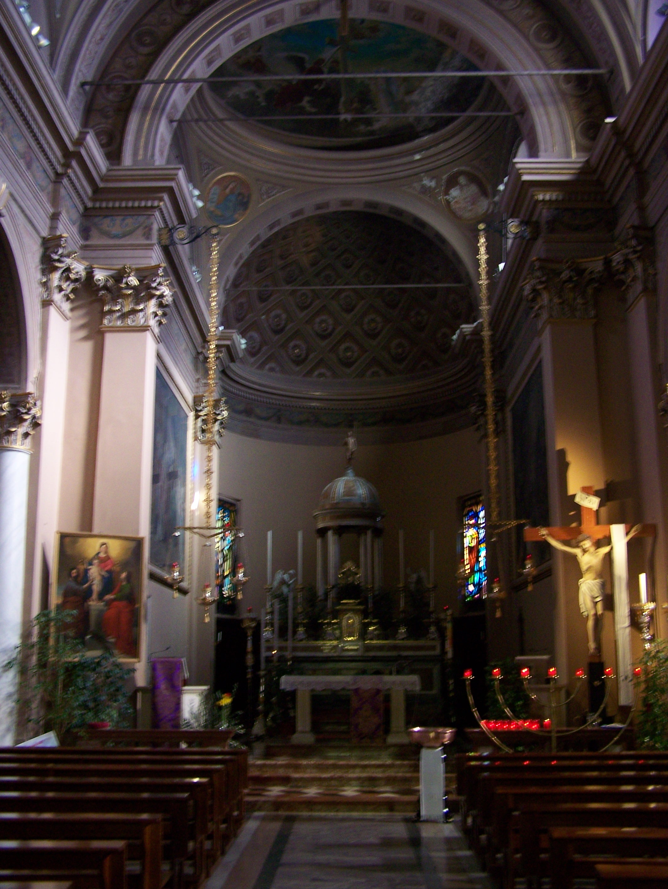 Chiesa parrocchiale di Vittuone - interno (Italia)